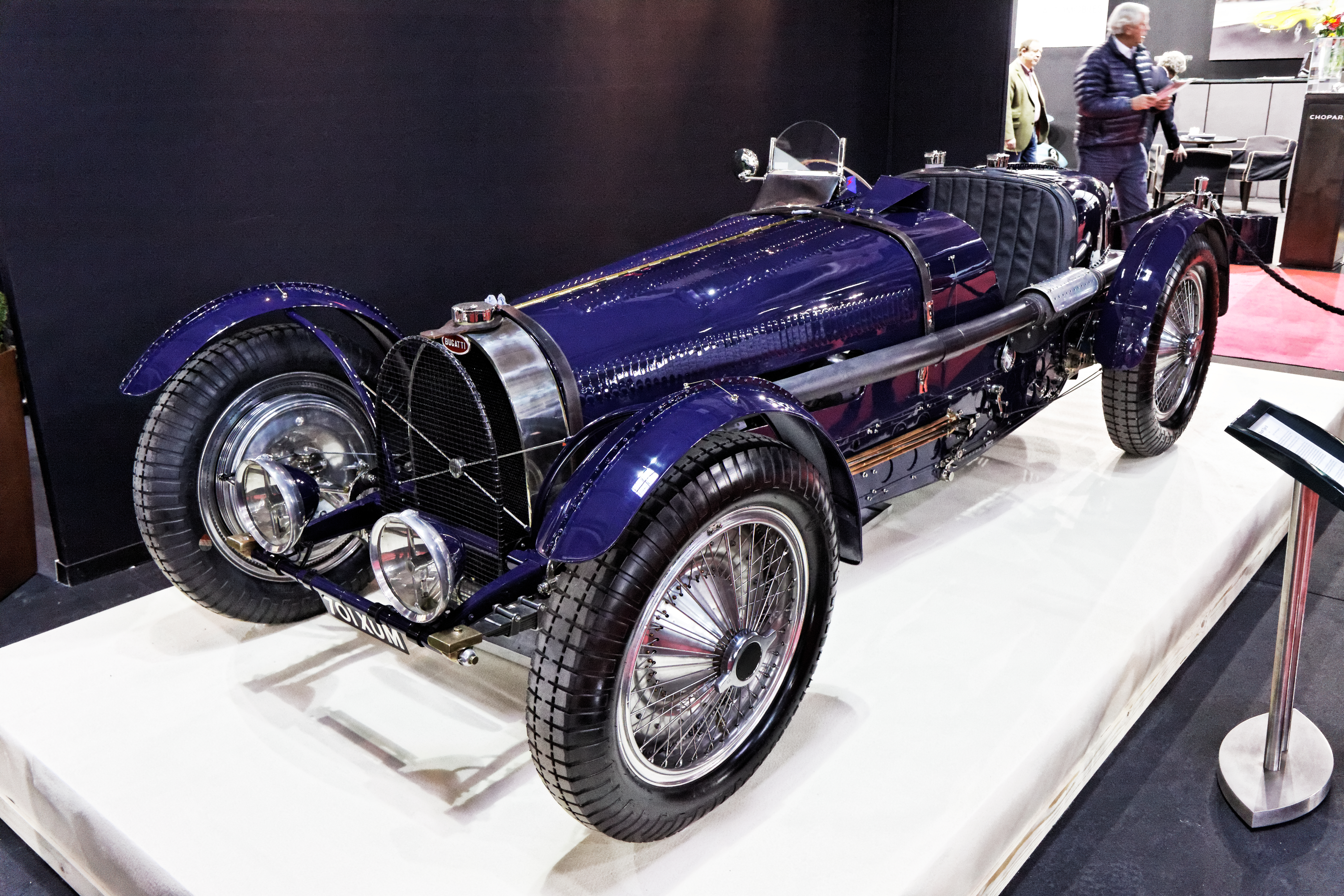 Une Bugatti type 59 présentée lors du salon Retromobile 2013.